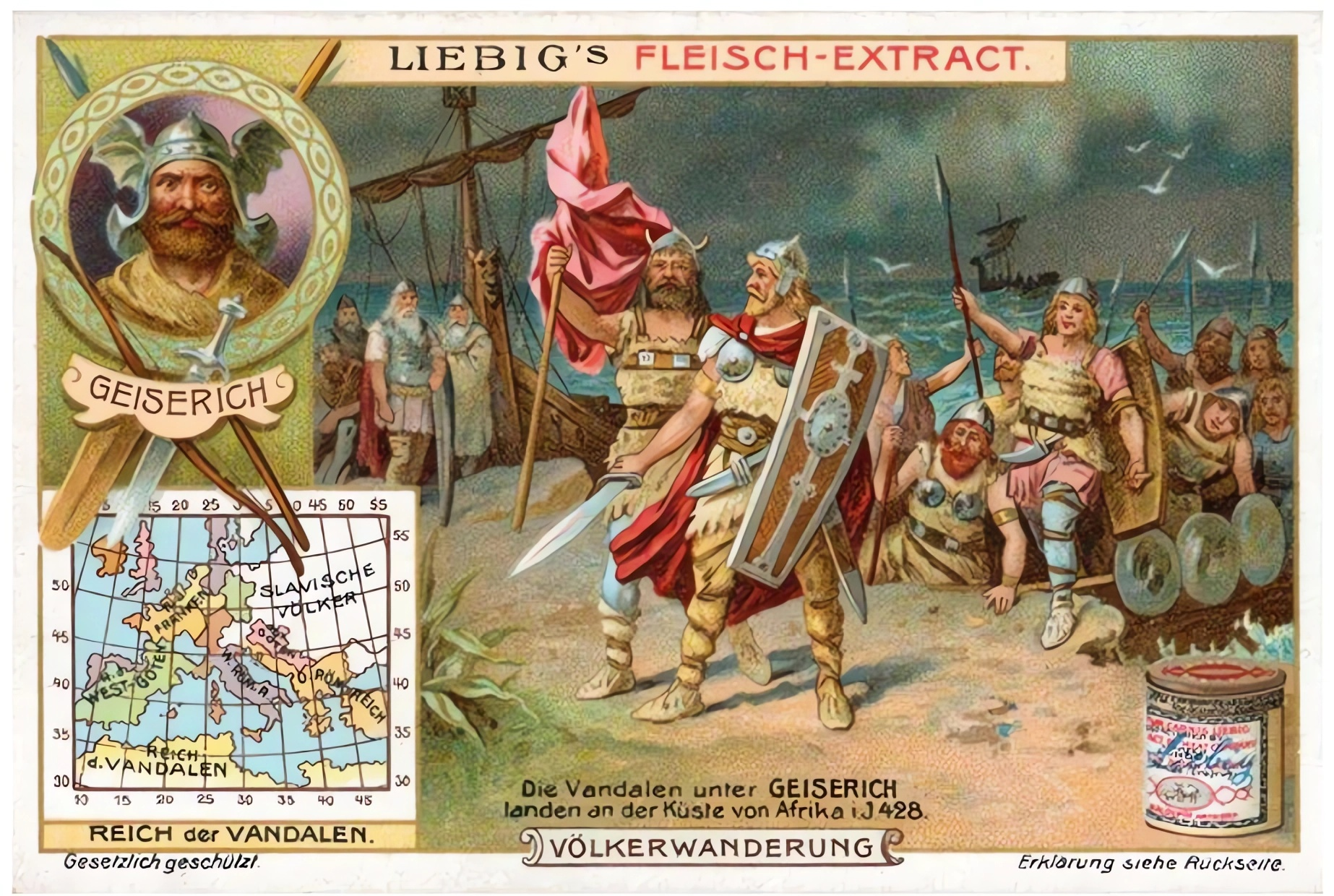 Die Vandalen unter GEISERICH landen an der Küste von Afrika i.J. 428 (bzw. 429)